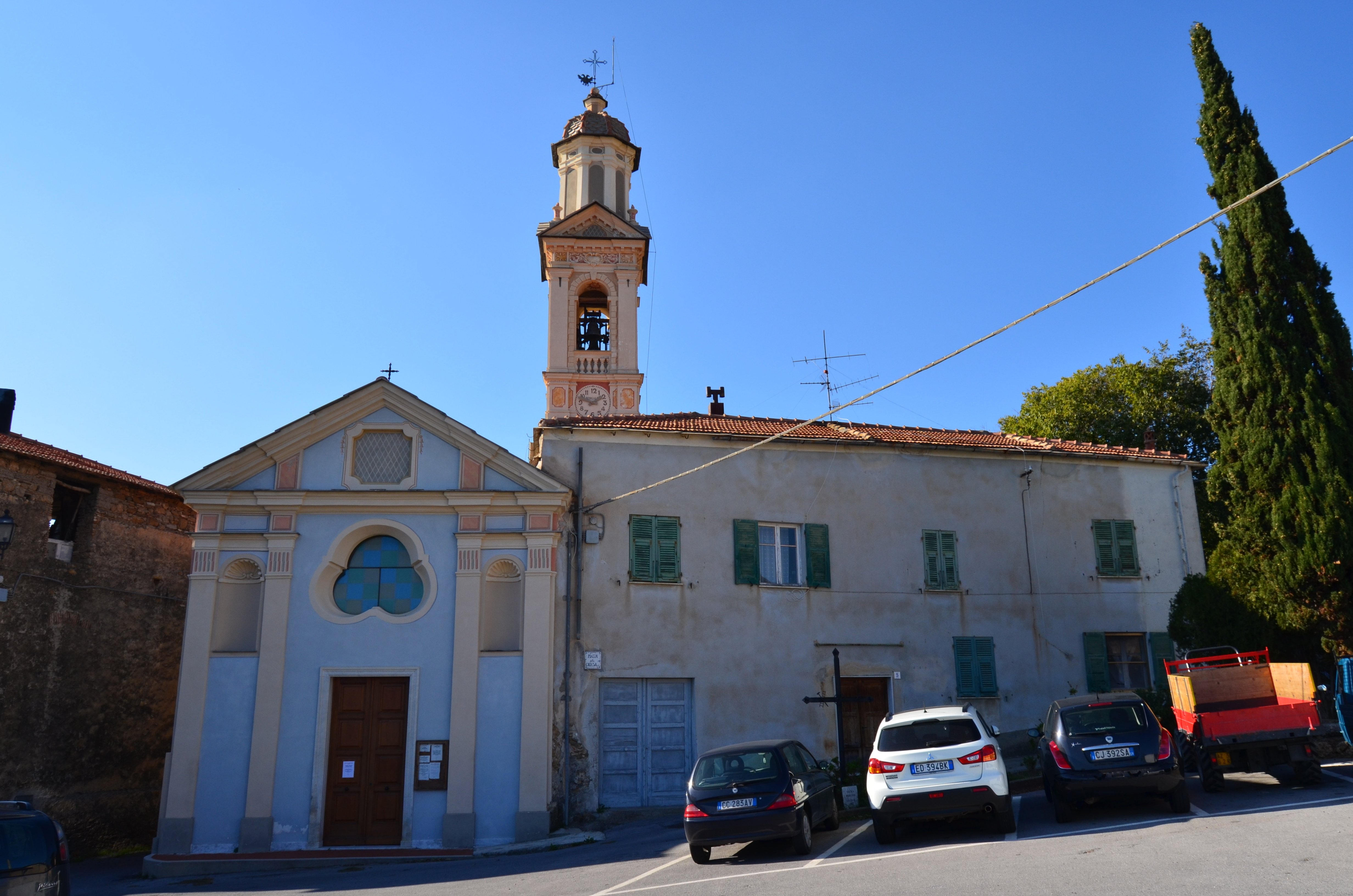 La chiesa di San Nicola, Cenesi, Cisano sul Neva, Liguria, Italia